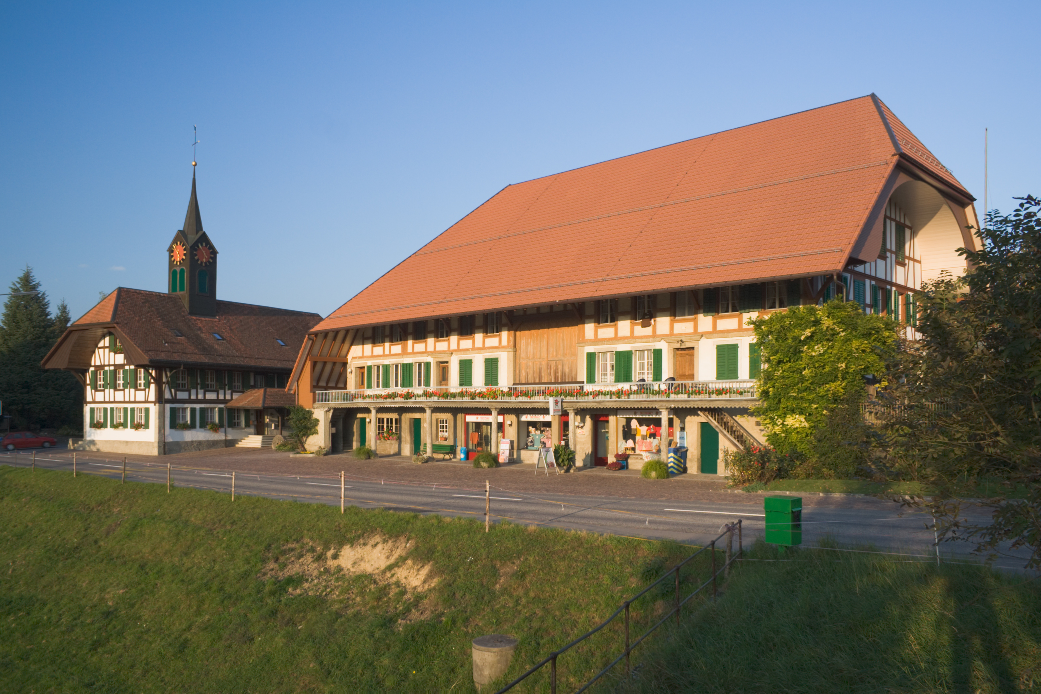 Das Zentrum von Schnottwil, SchweizLinks im Bild die GemeindeverwaltungAufnahme mit Polfilter